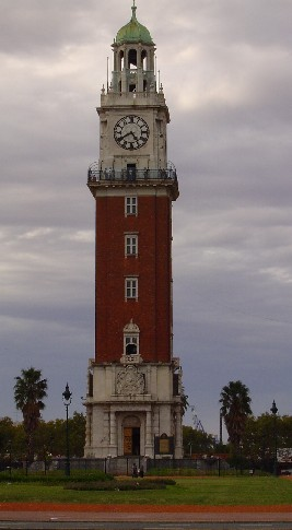 Torre Monumental (antigua Torre de los Ingleses), Buenos Aires.